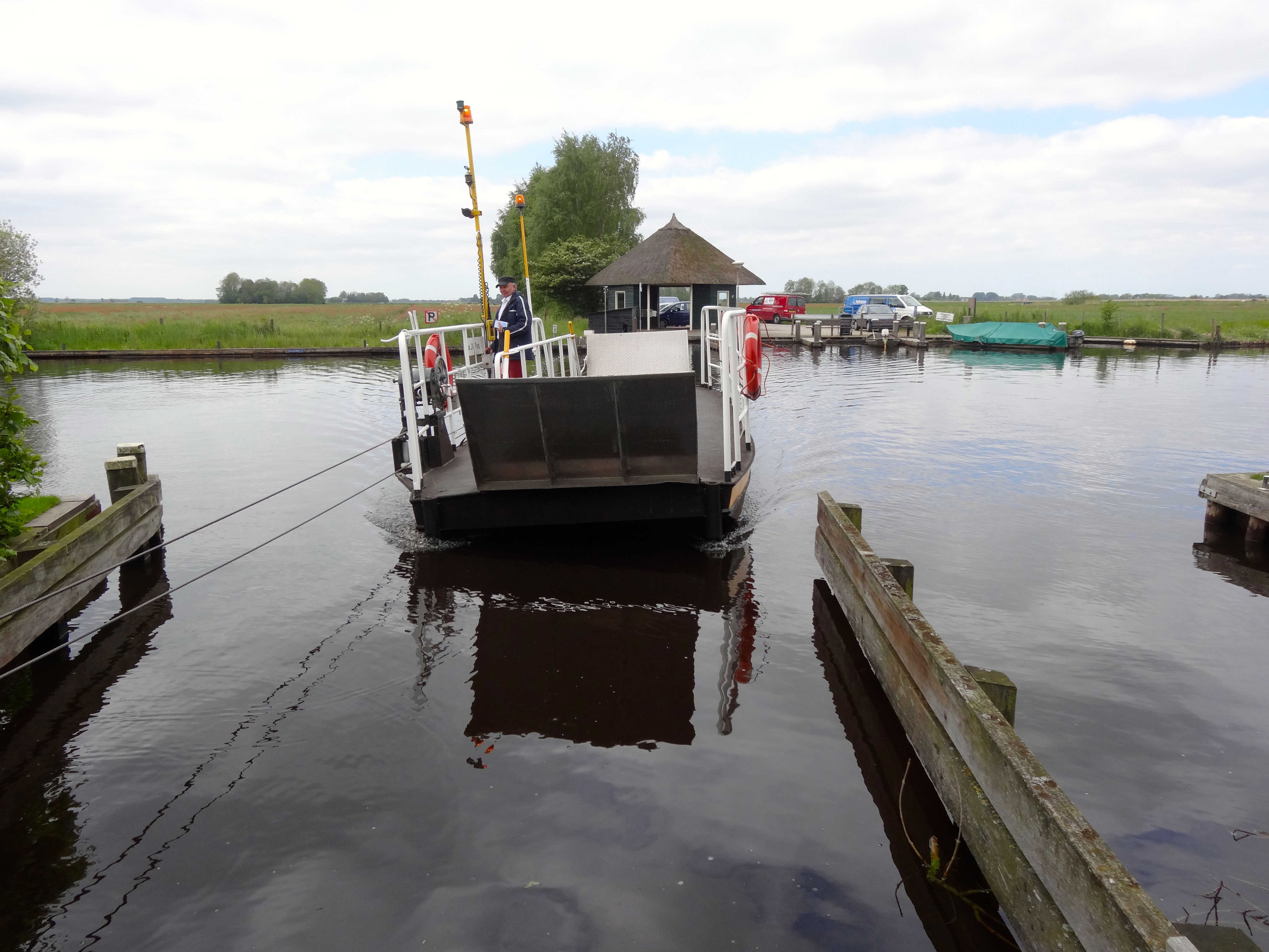 Pontje over de Walengracht bij Jonen